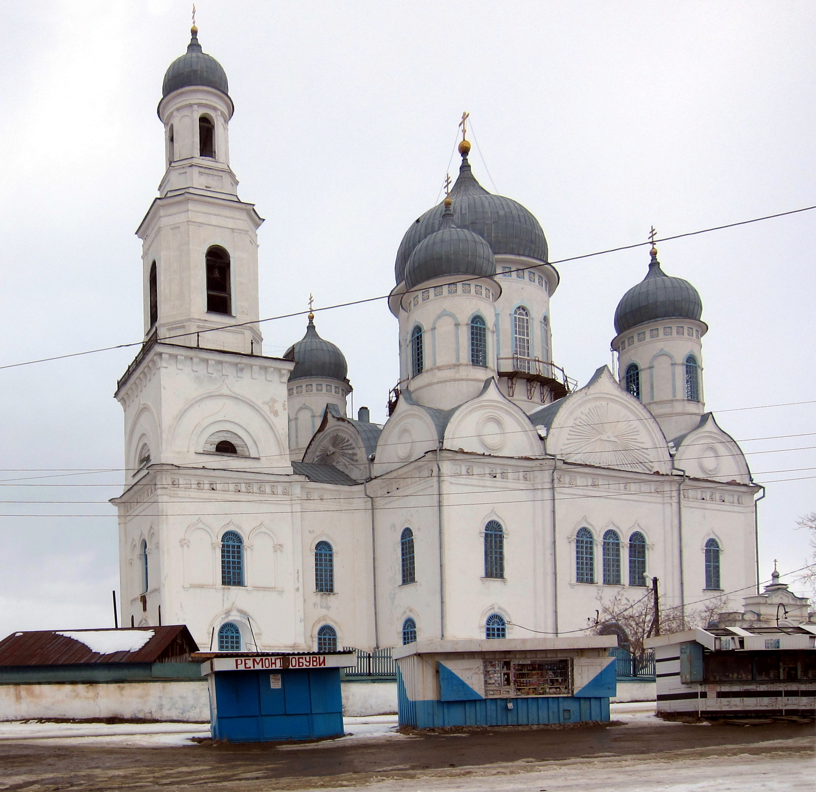 Церковь Вознесения (Челябинская область, Касли, улица Коммуны, у автовокзала)